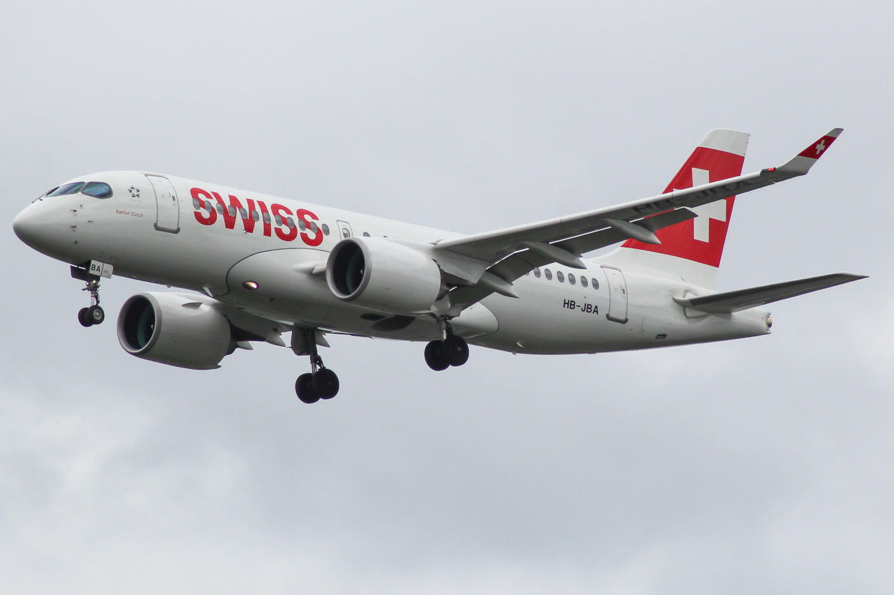 HB-JBA Bombardier CS-100 Swiss